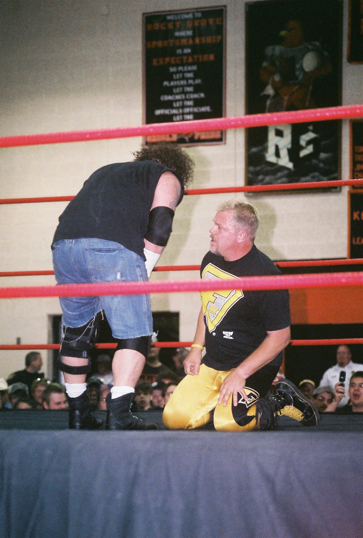 from Franklin, PA 4-10-10